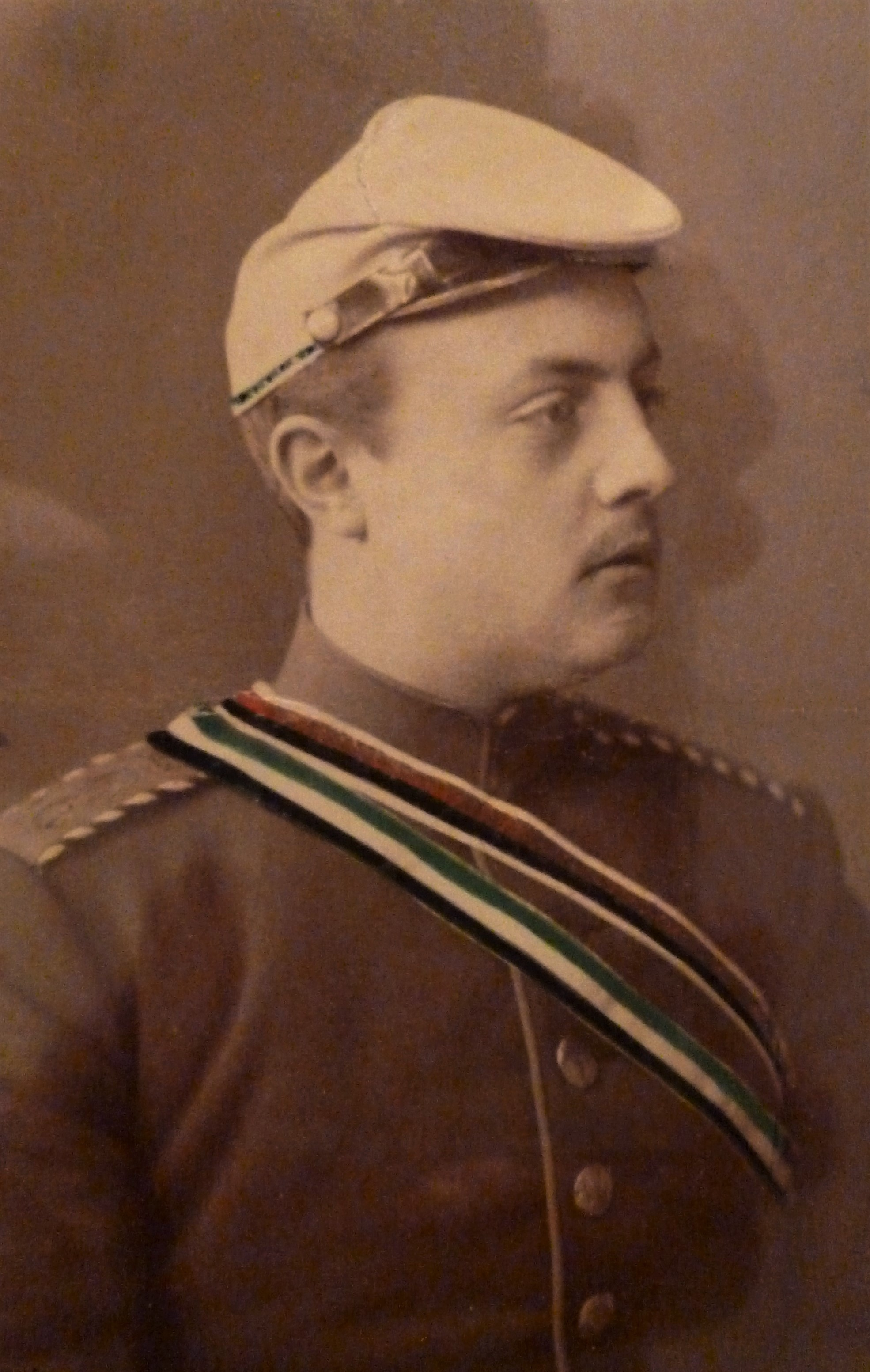 Arnold Paulssen als Mitglied des Corps Hasso-Borussia.